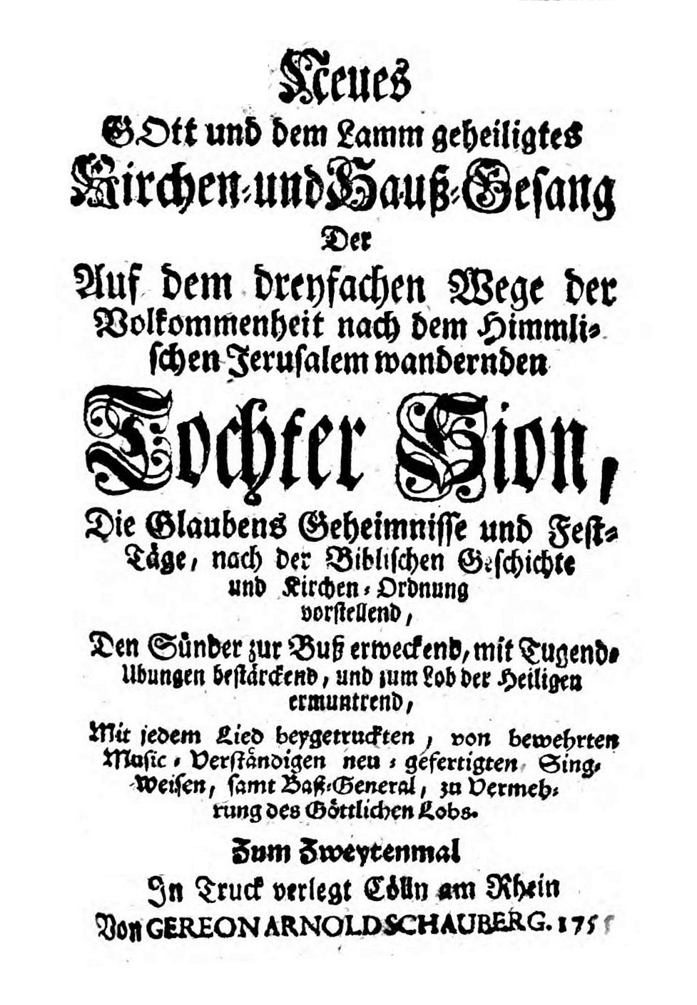 Heinrich Lindenborn: Neues Gott und dem Lamm geheiligtes Kirchen- und Hauß-Gesang der auf dem dreyfachen Wege der Volkommenheit nach dem himmlischen Jerusalem wandernden Tochter Sion (2. Auflage), Köln 1755, Titelseite